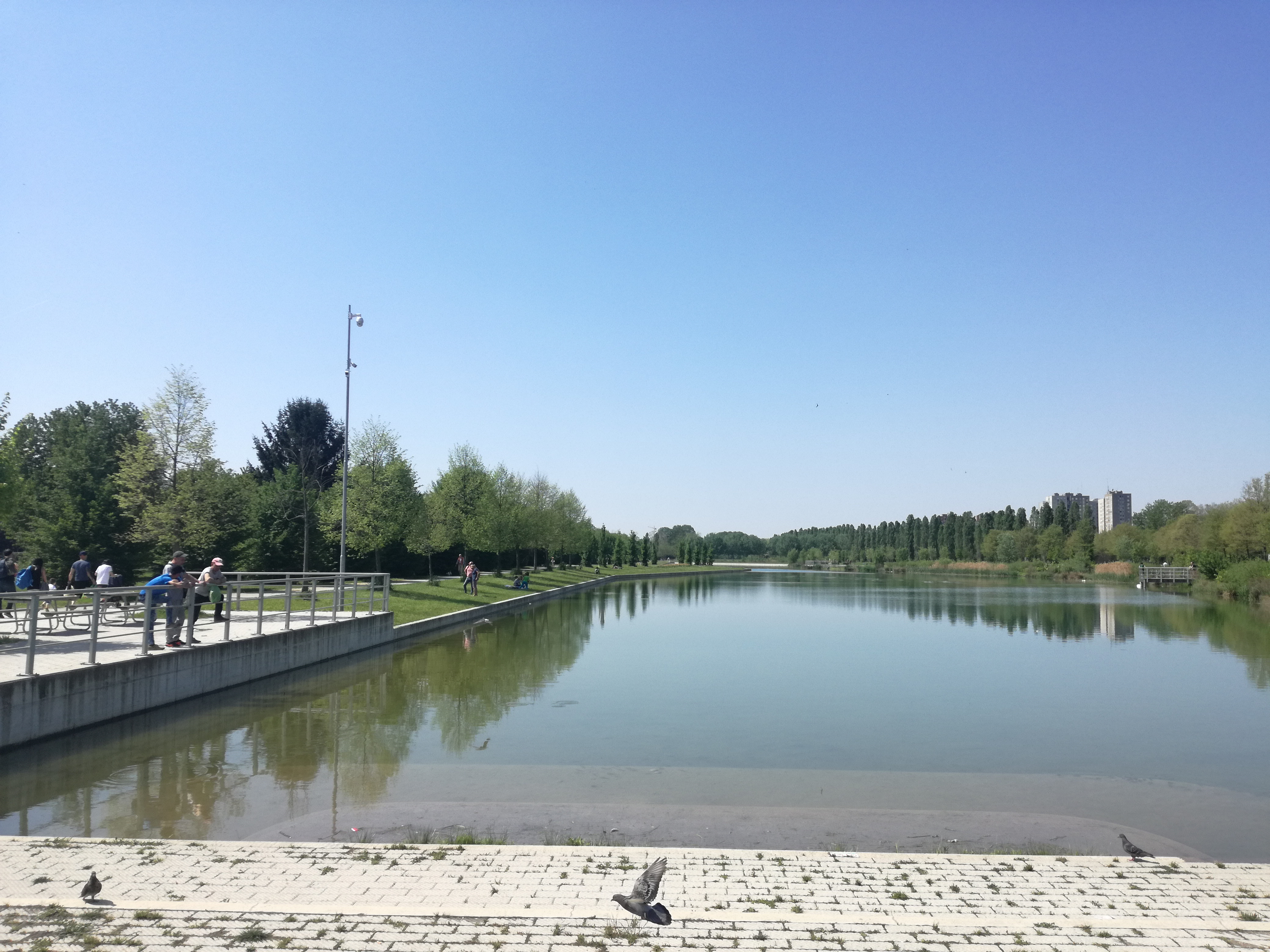 Lumbaart: Lagh de Ninguarda in del 2018